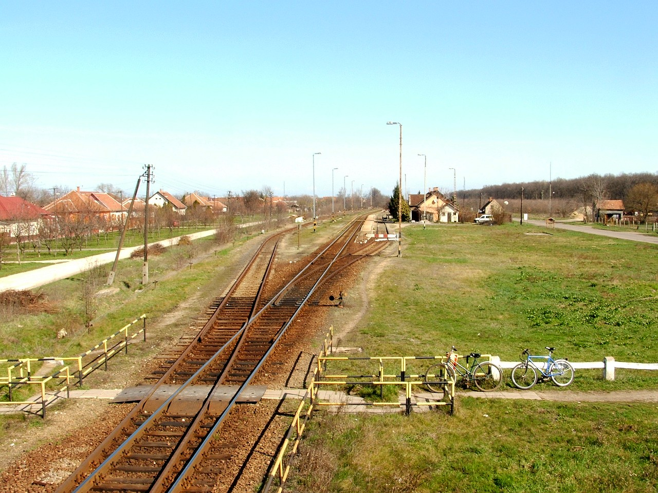 Kengyel vasútállomásának vágányai a Szolnok–Hódmezővásárhely–Makó-vasútvonalon.